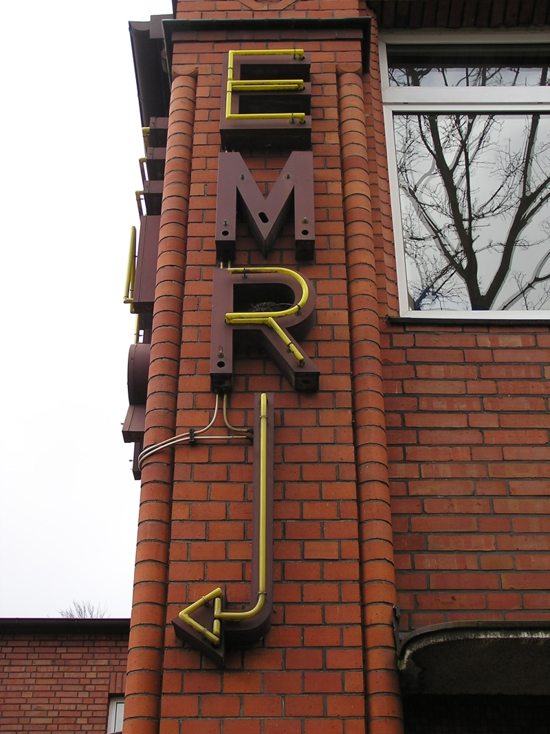 Logo des Elektrizitätswerks Minden-Ravensberg am Gebäude der Stadtwerke Minden.